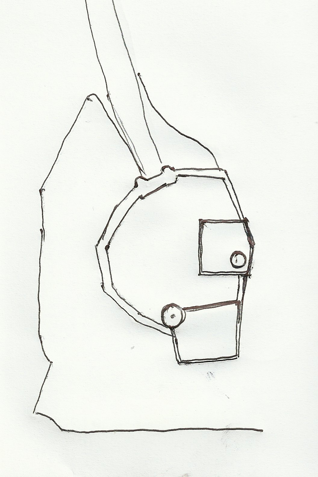 Croquis de la forme visible du ciel du château Saint-Clair de la Chaume.